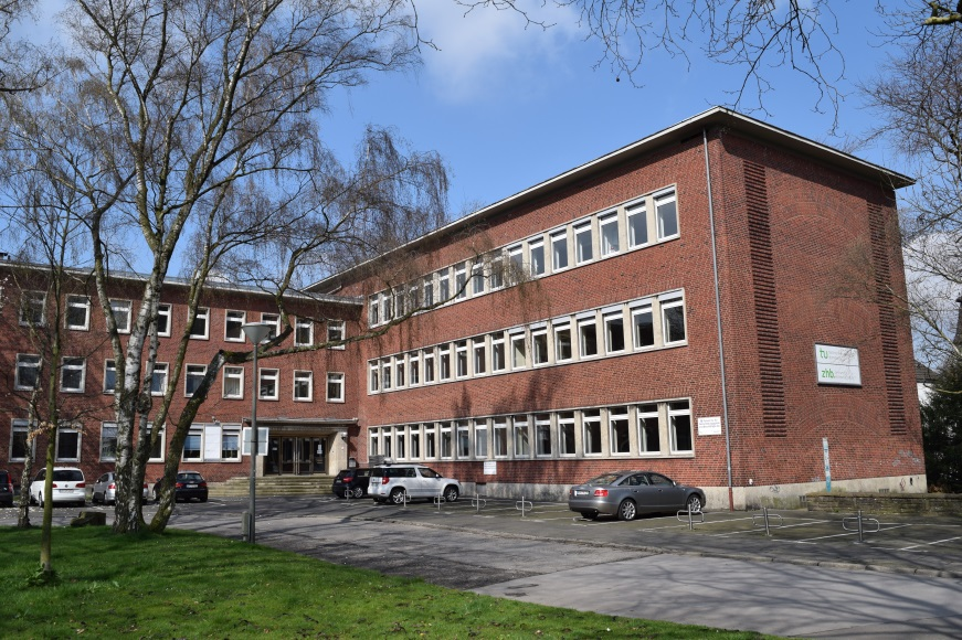 Zeigt das Hauptgebäude des zhb der TU Dortmund in der Hohen Straße 141